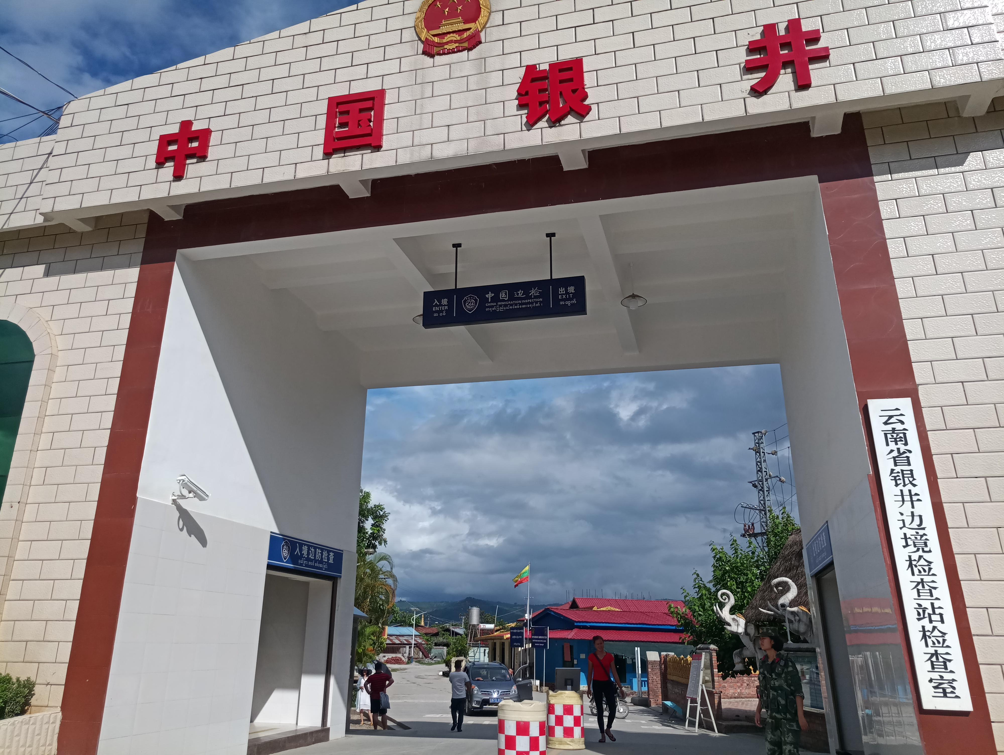 中文（中国大陆）: 瑞丽市中缅边界银井通道